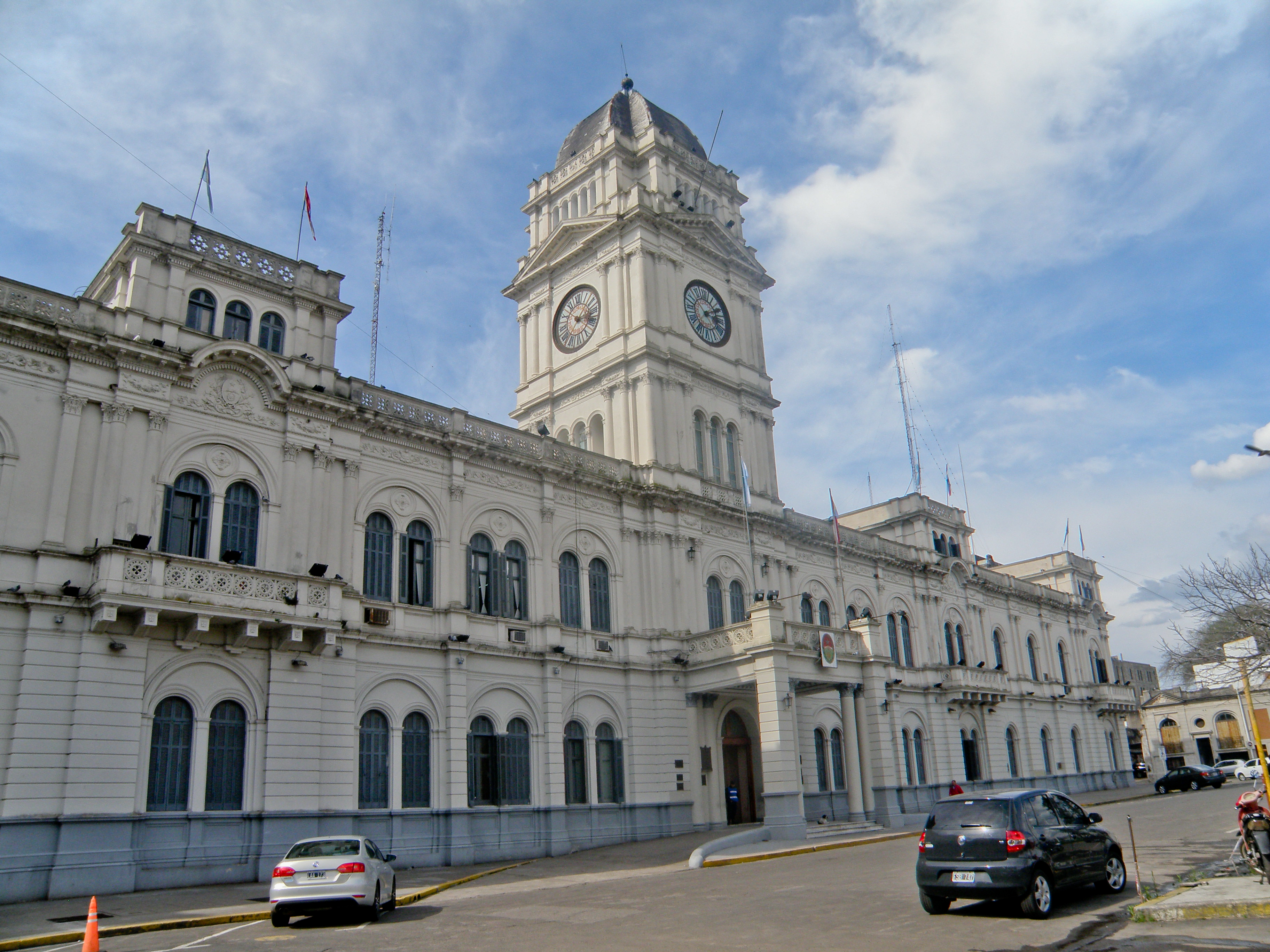 La Casa de Gobierno de la provincia de Entre Ríos fue declarada monumento nacional por resolución del año 1986. En 1884, el gobernador de la provincia, General Eduardo Racedo, encomendó al jefe del departamento topográfico, Don Bernardo Rigolli, el proyecto de una casa de gobierno encargada de centralizar los poderes ejecutivo y legislativo. La obra, concebida a modo de palacio europeo, se encuentra coronada por una torre reloj. Este ultimo de procedencia correntina. La casa contratista encargada de crear el reloj y las campanas fue Ernesto Hoffmann y Augusto Sedner. Augusto Sedner, relojero constructor, combinó el mecanismo en todos sus detalles; ordeno su especial fabricación, y coloco toda la obra en la torre construida íntegramente bajo sus ordenes.